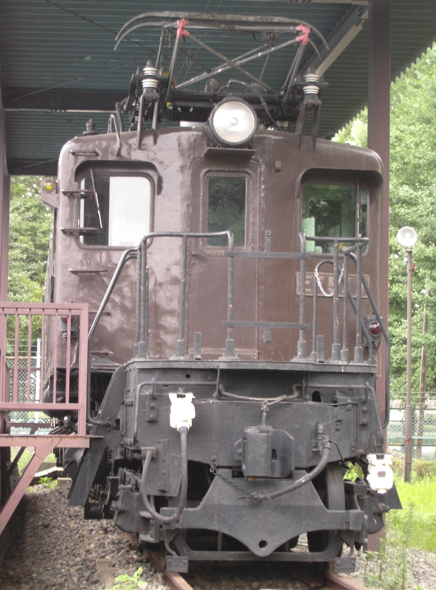 投稿者撮影